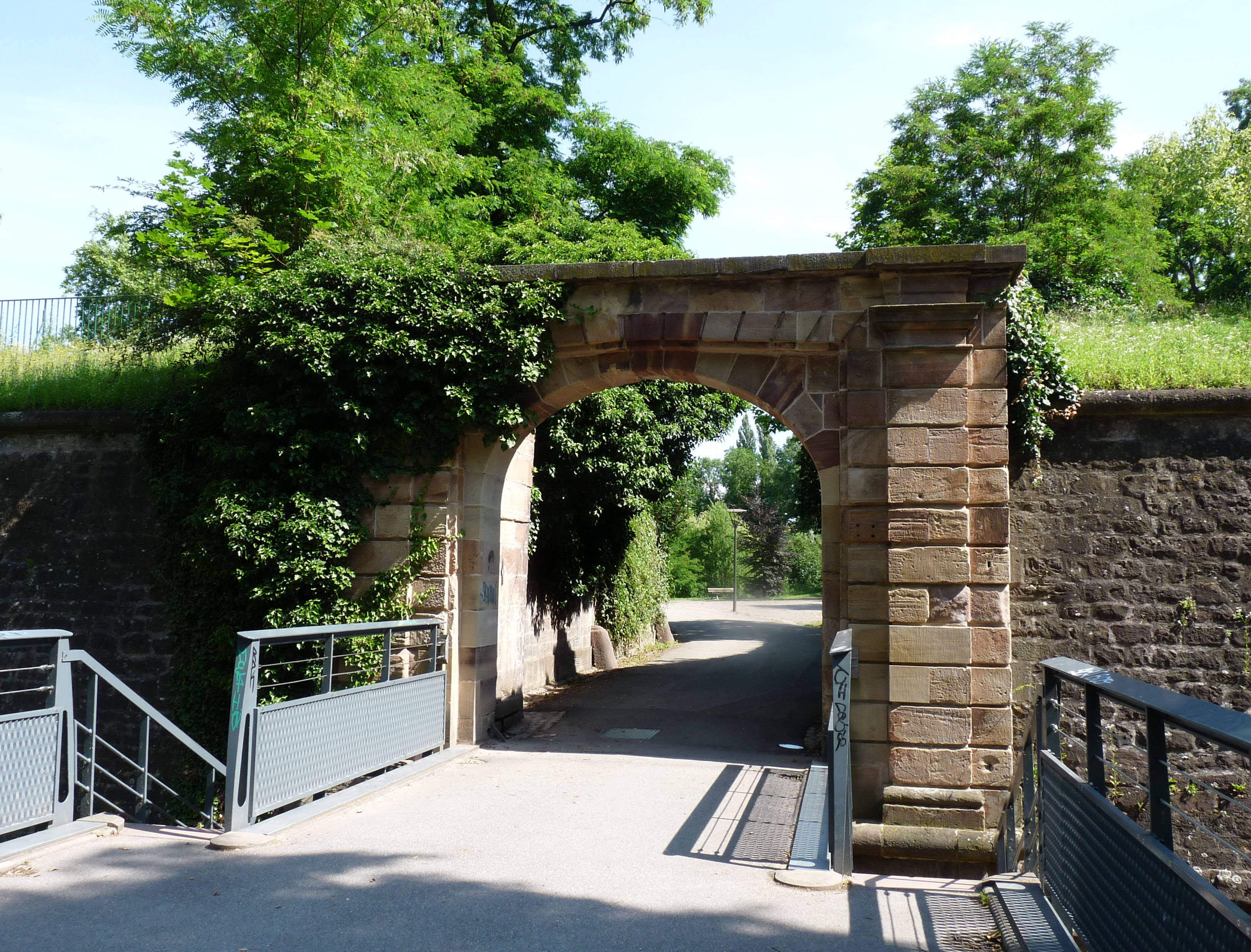 Fortification Vauban (Parc de la Citadelle, Strasbourg)